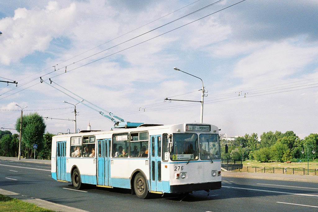 Троллейбус ЗИУ-682 в Могилёве.